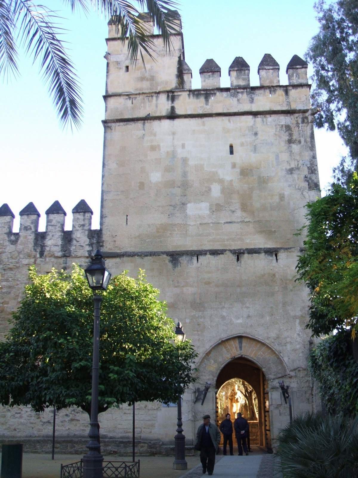 Córdoba - Alcázar de los Reyes Cristianos